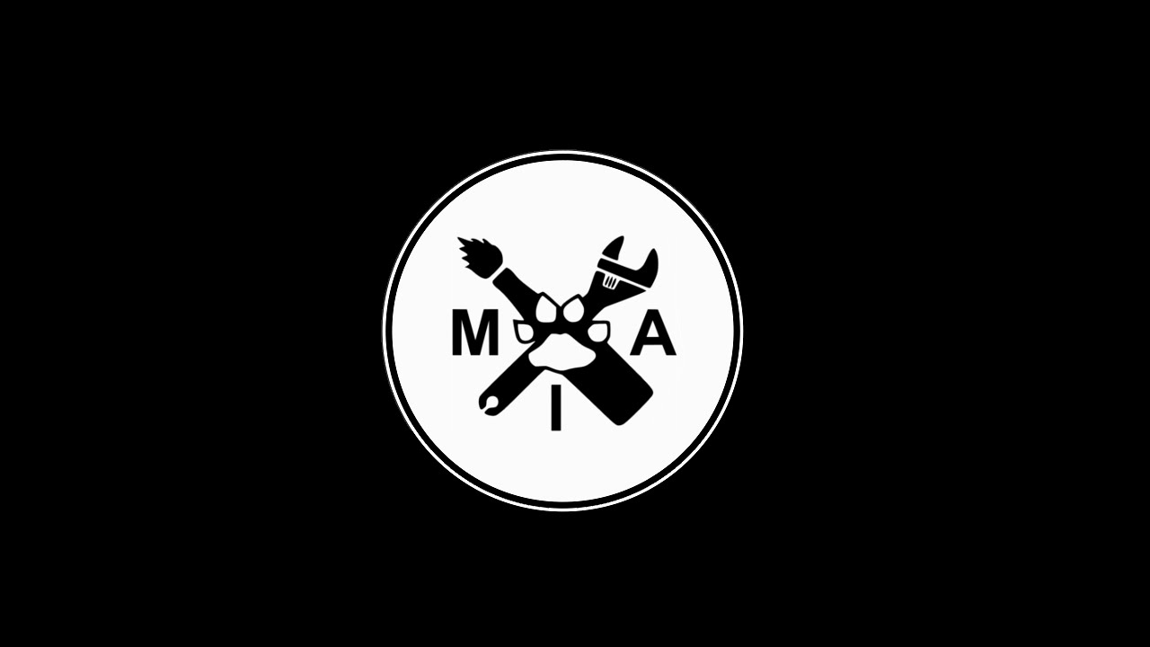 Bandeira do Movimento Insurgente Anarquista.